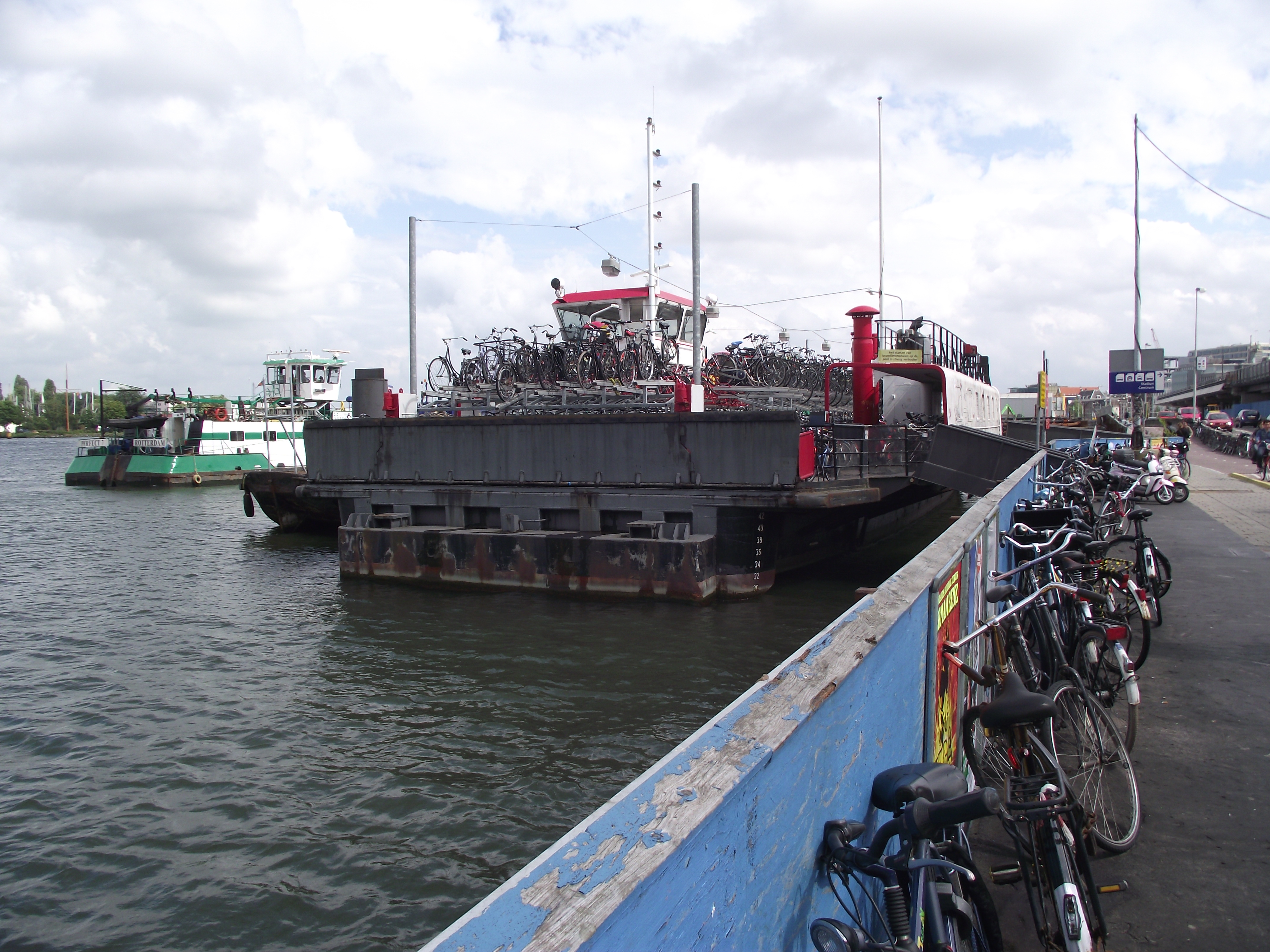 Fietsenstalling op een aangemeerde veerpont bij Amsterdam CS. Dit is de oude Rijkspont nr. 5 die vroeger over het Noordzeekanaal voer.